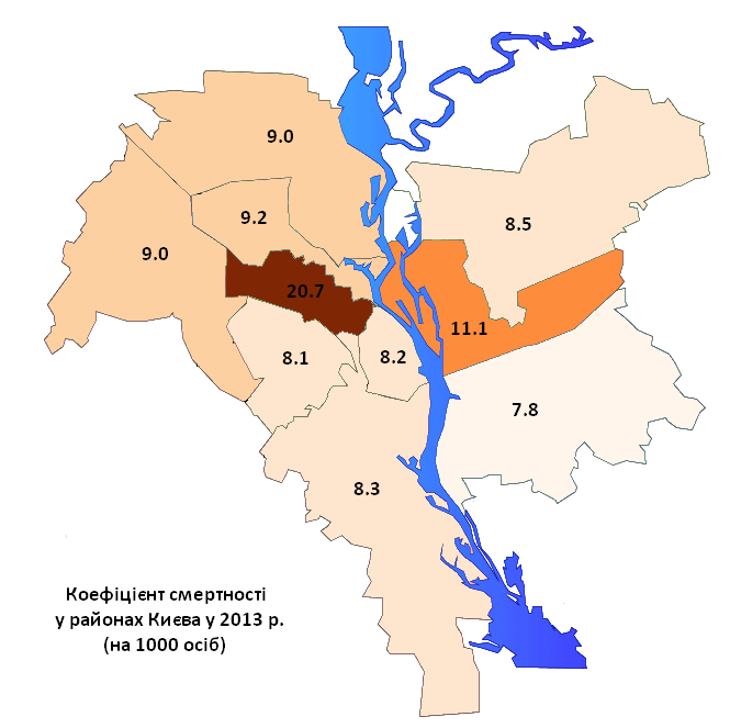 Коефіцієнт смертності населення районів Києва у 2013 р. (на 1000 осіб) / Population death rate in raions of Kyiv in 2013 (per 1000)